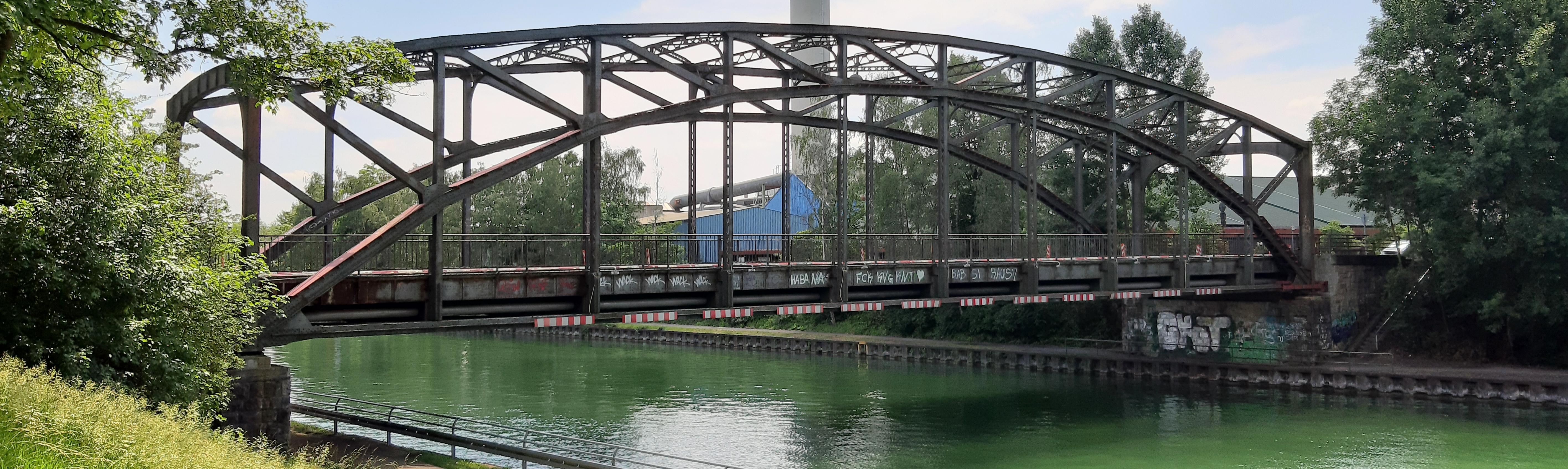 Prinzenbrücke, in Hintergrund der Rockwool-Schornstein am Bahnhof Münster-Hiltrup